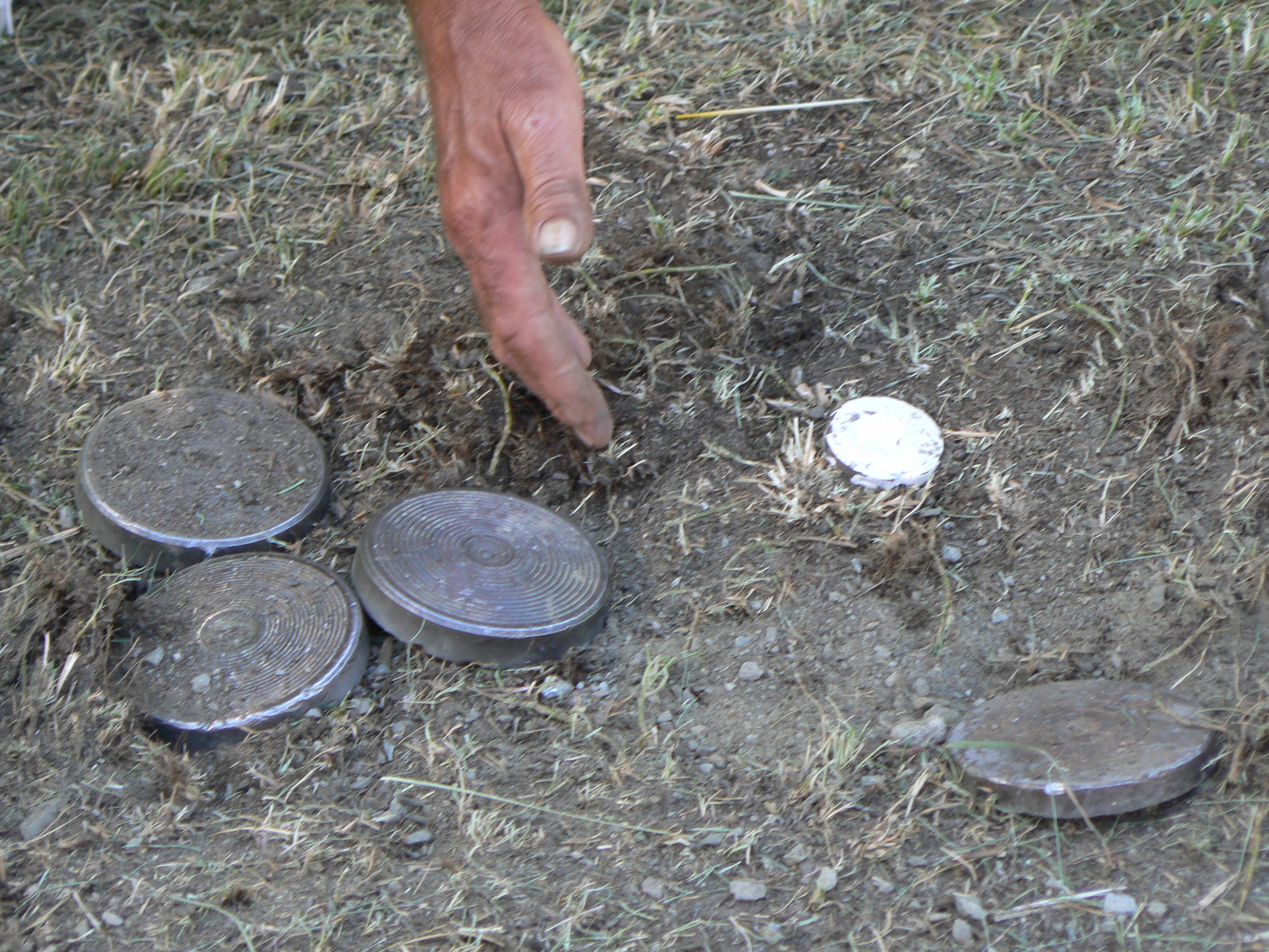 Un giocatore indica la posizione del boccino al lanciatore. Partita di palet valdostano "a baraonda" durante la Festa della Favò 2012 nella frazione di Ozein, Aymavilles, Valle d'Aosta, Italia.